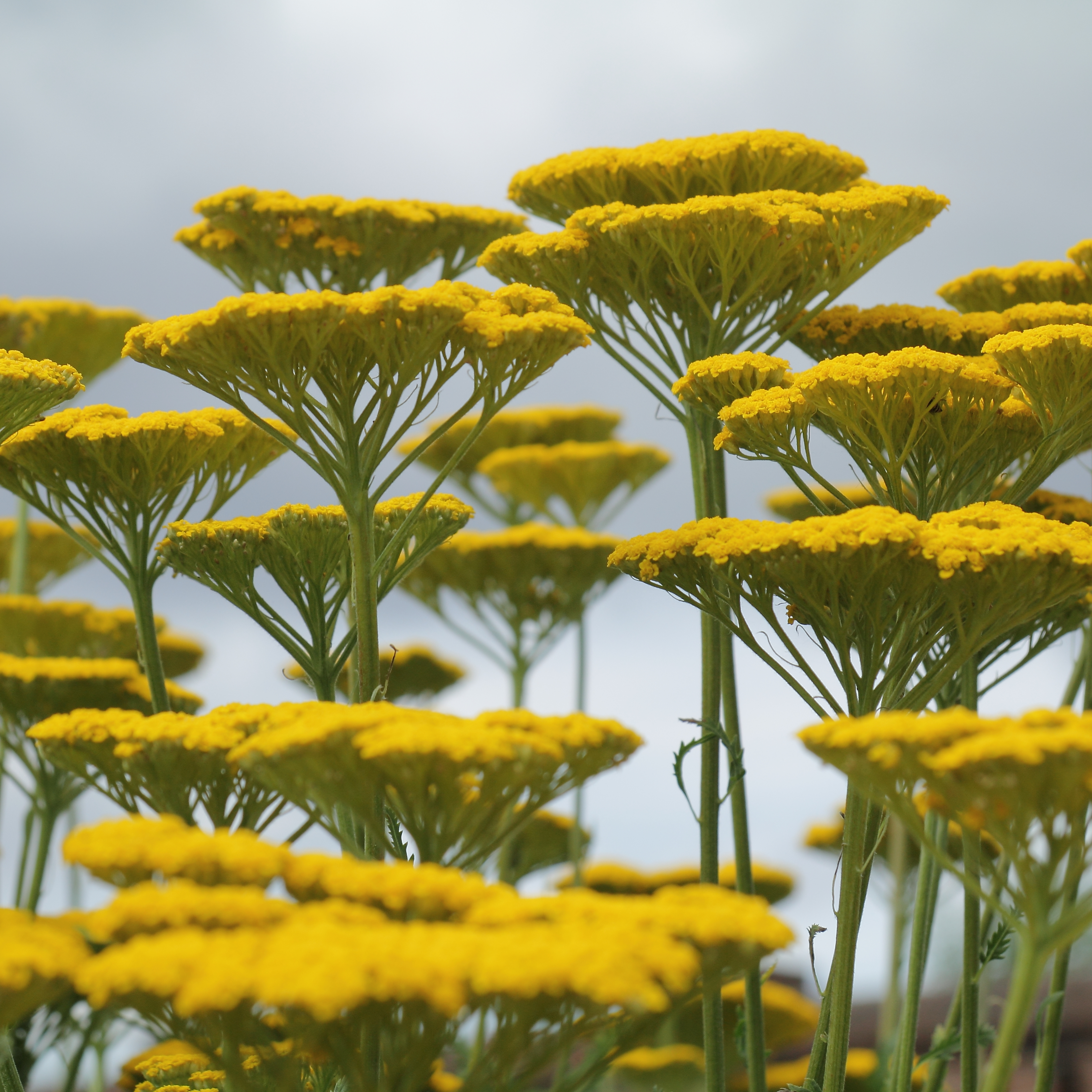 identifierad med hjälp av befintlig skylt vid Kew Gardens, London.